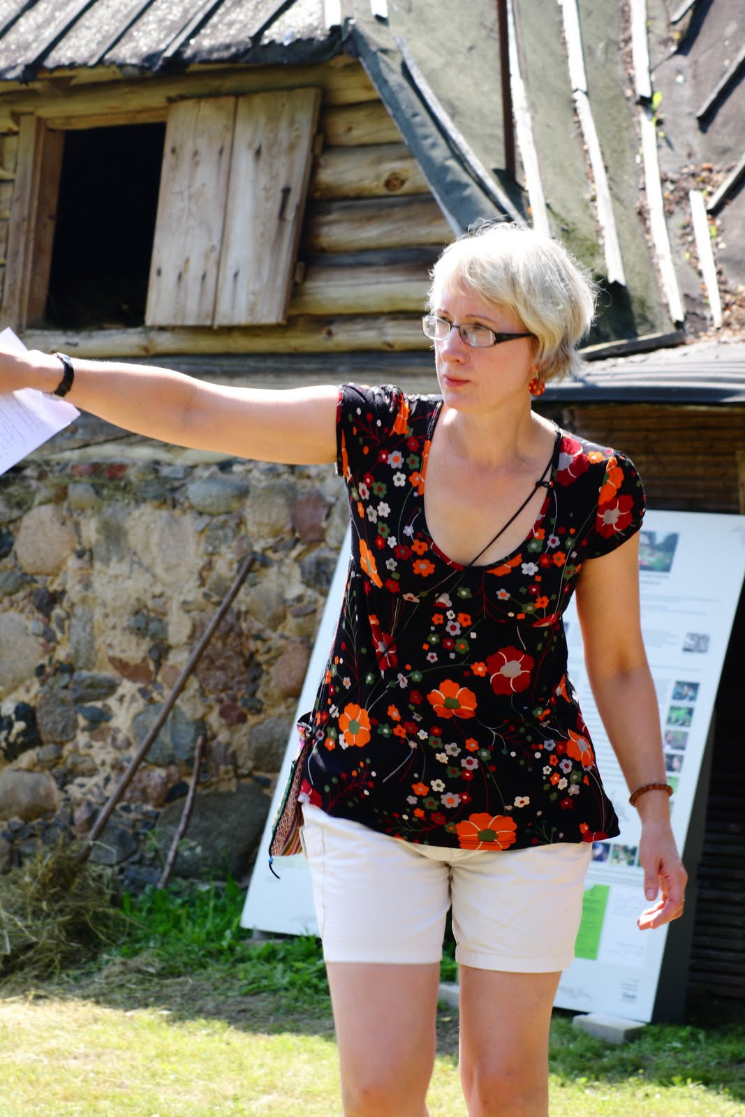 Kirjandusteadlane Marin Laak Nüpli suvekoolis, juuli 2013